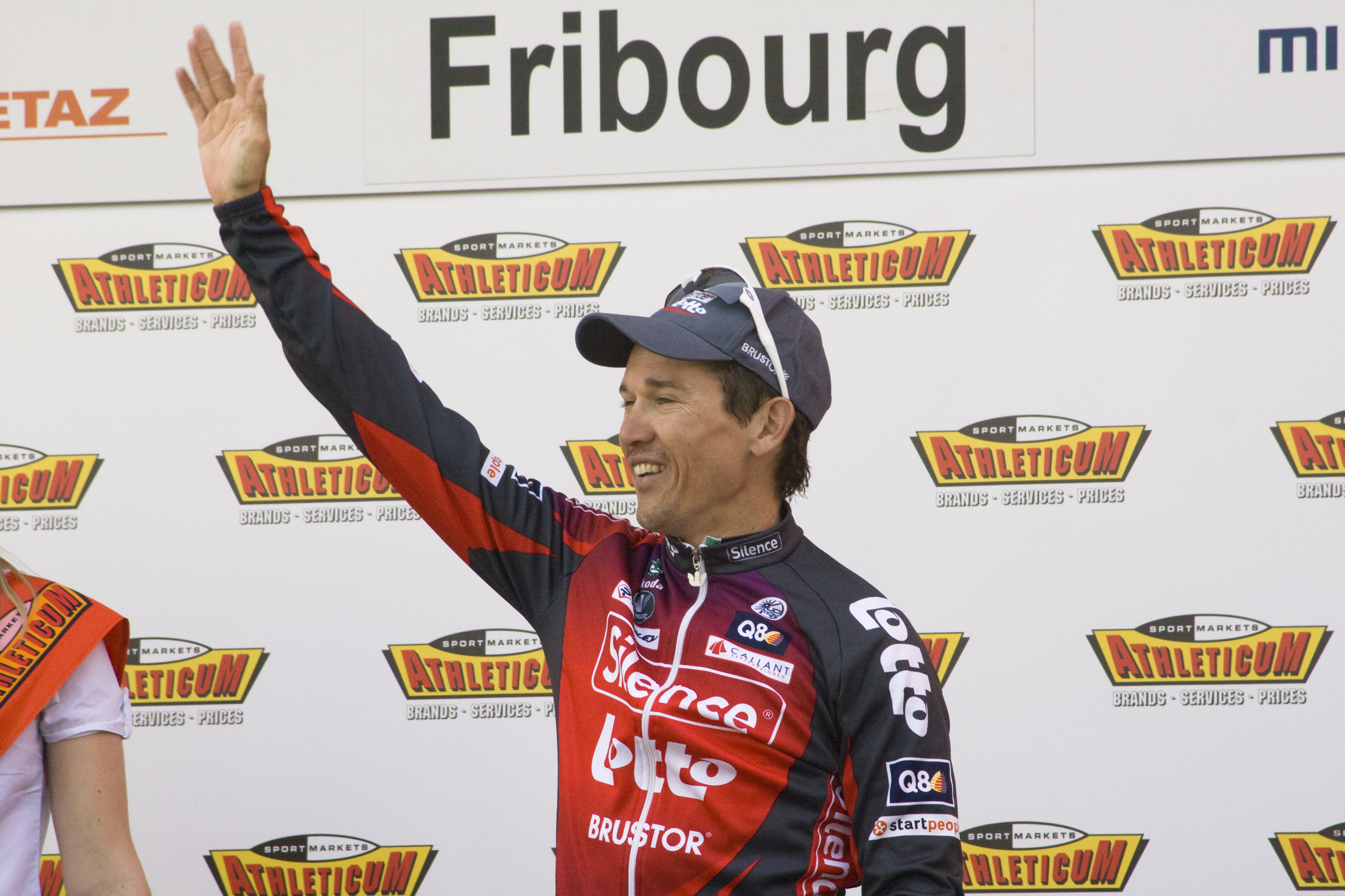 McEwen Robbie vainqueur à Fribourg Tour de Romandie 2008.